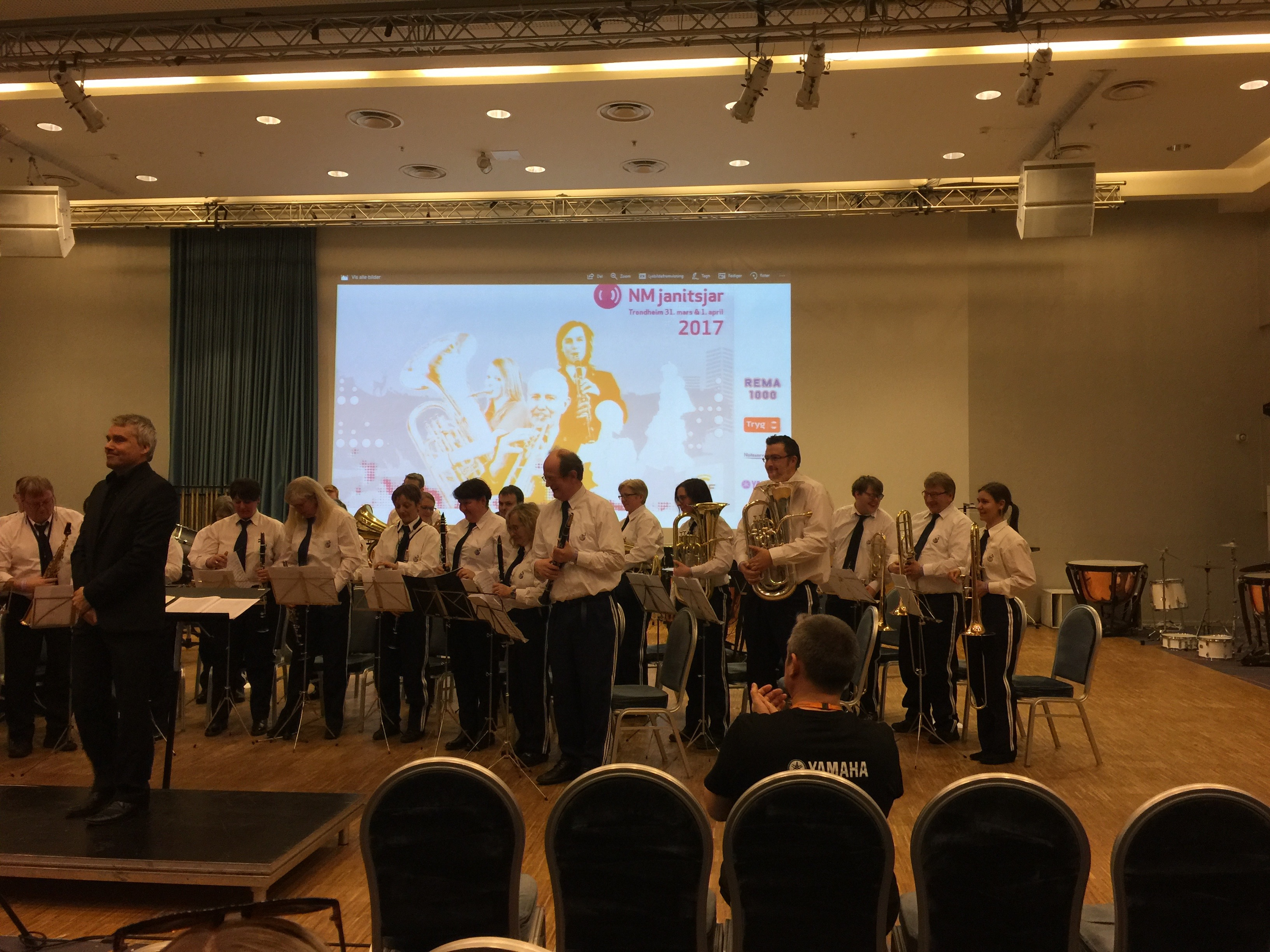 NM janitsjar 2017